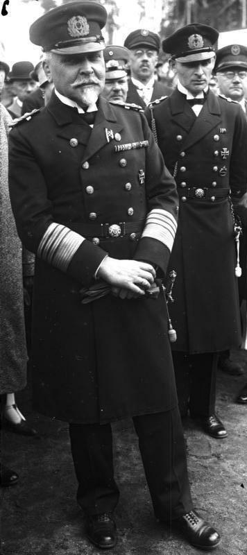 Admiral Zenker der ehemalige Chef der Marineleitung ist im Alter von 62 Jahren gestorben ! Admiral Hans Zenker, zeichnete sich im Kriege in der Schlacht am Skagerrak auf dem Schlachtkreuzer "Von der Tann" besonders aus. Von 1924-1928 leitete er die Geschicke der deutschen Reichsmarine.